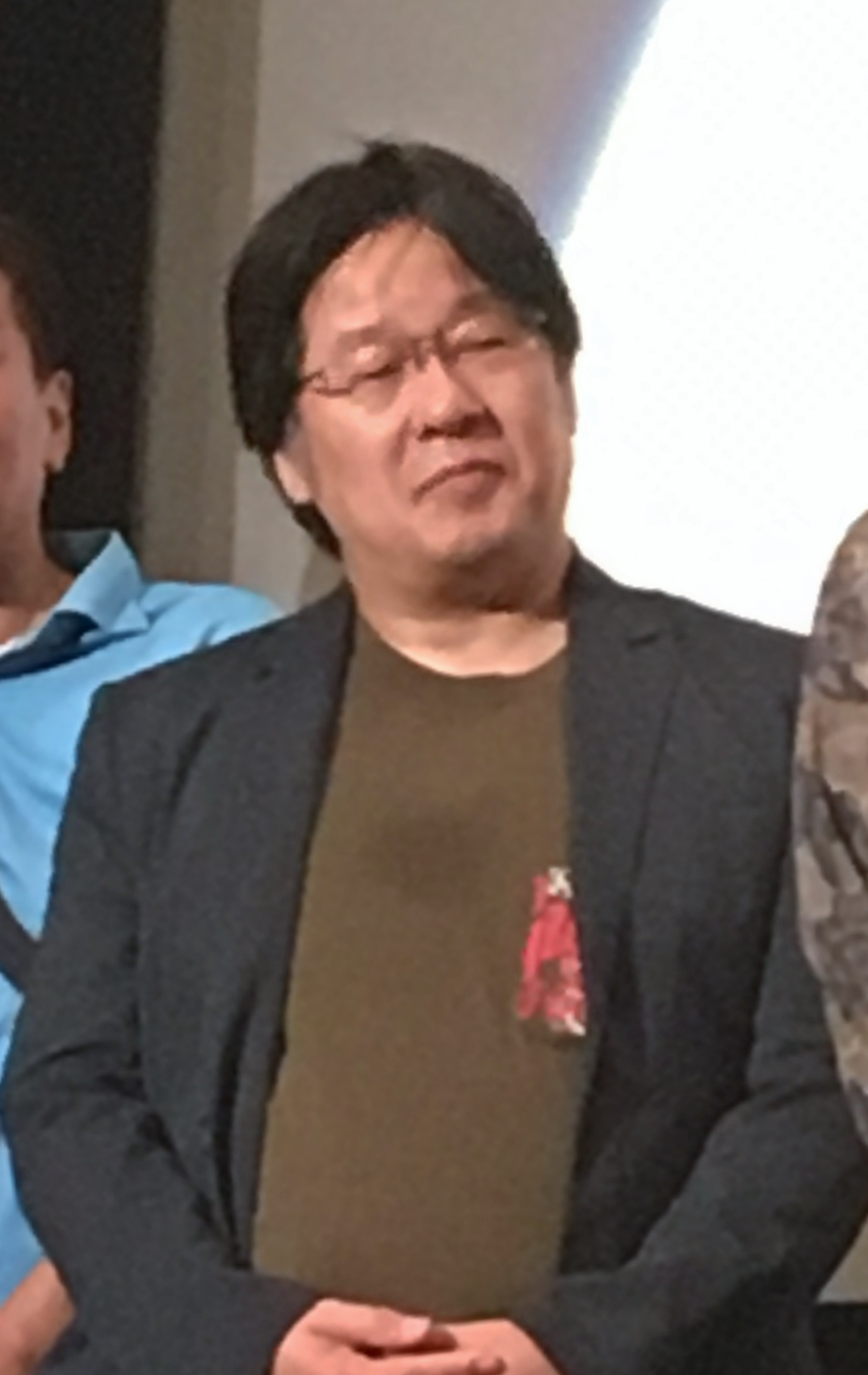 野火明（2018年9月8日、新宿K's cinema） クライングフリーセックス舞台挨拶にて